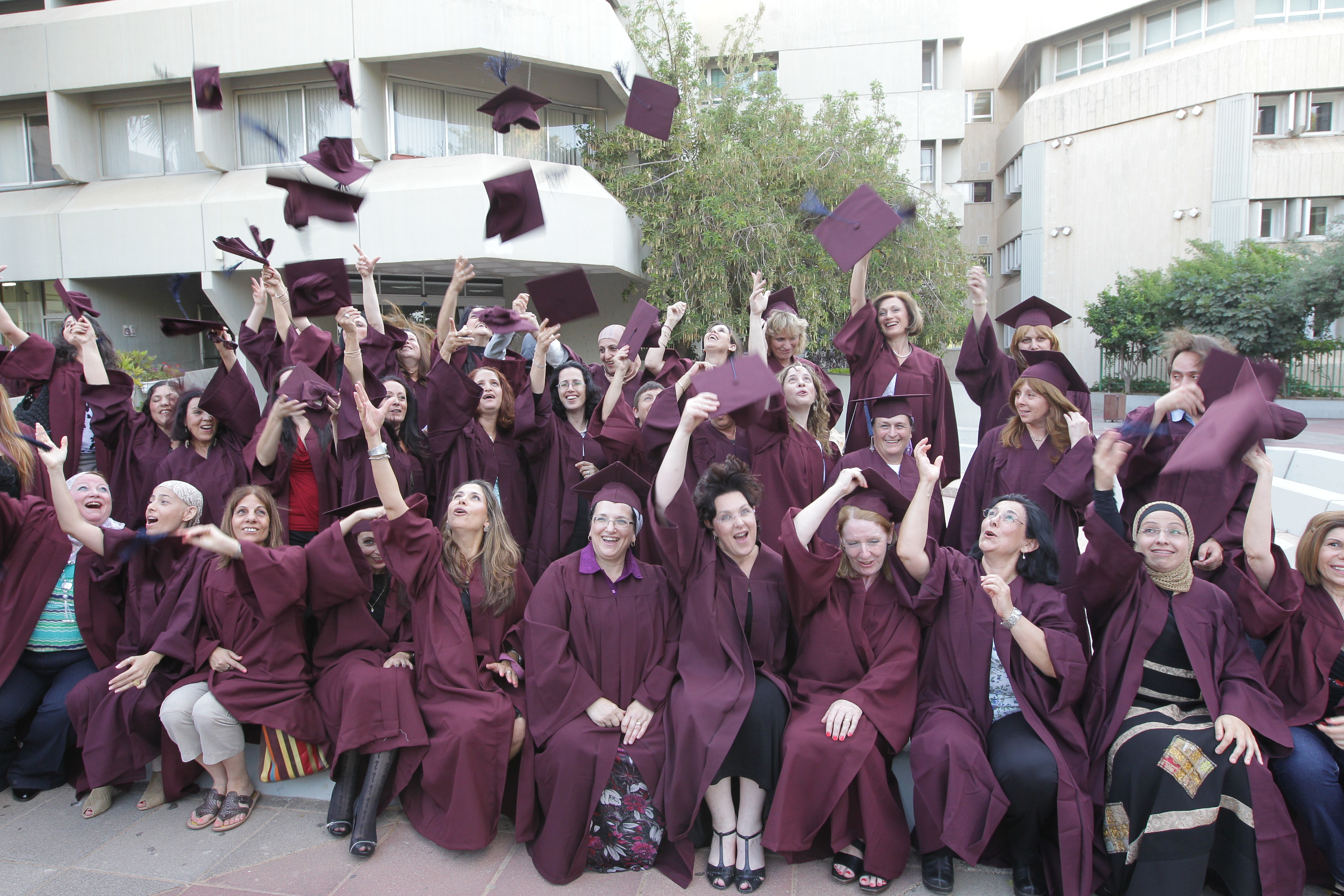 מוסמכים תואר שני במכללת לוינסקי לחינוך 2014